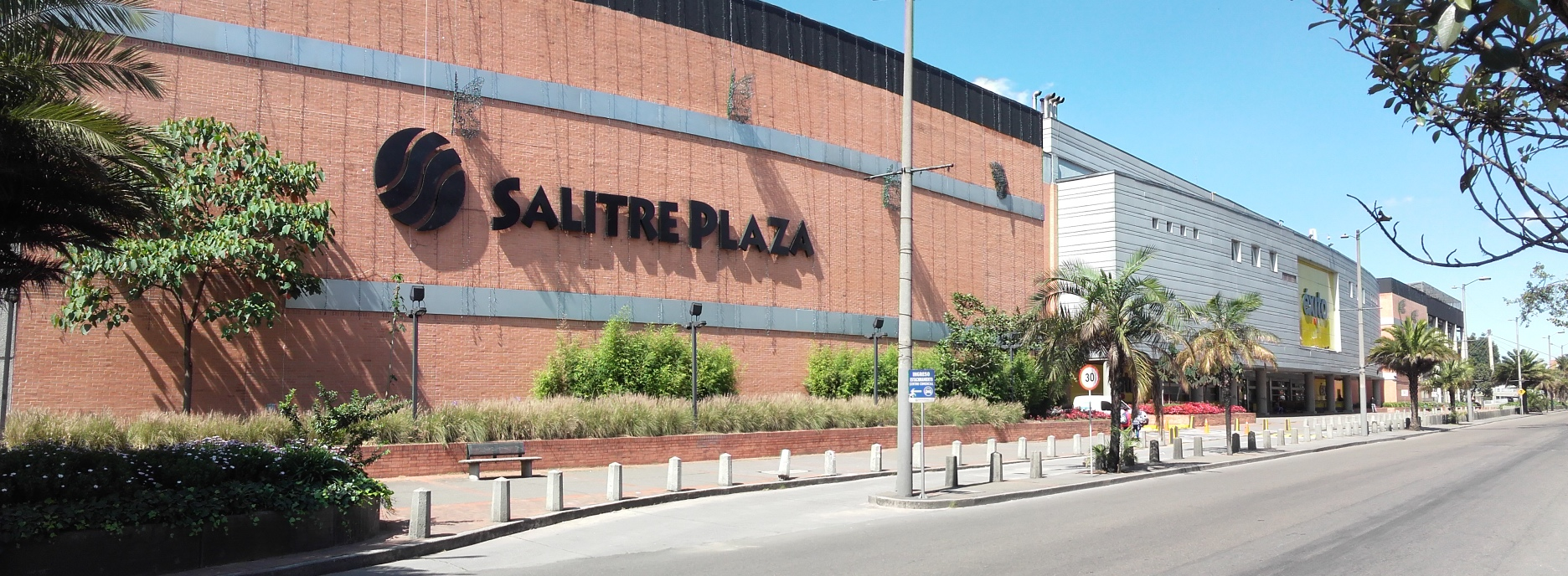 fnfnnfnfnfn